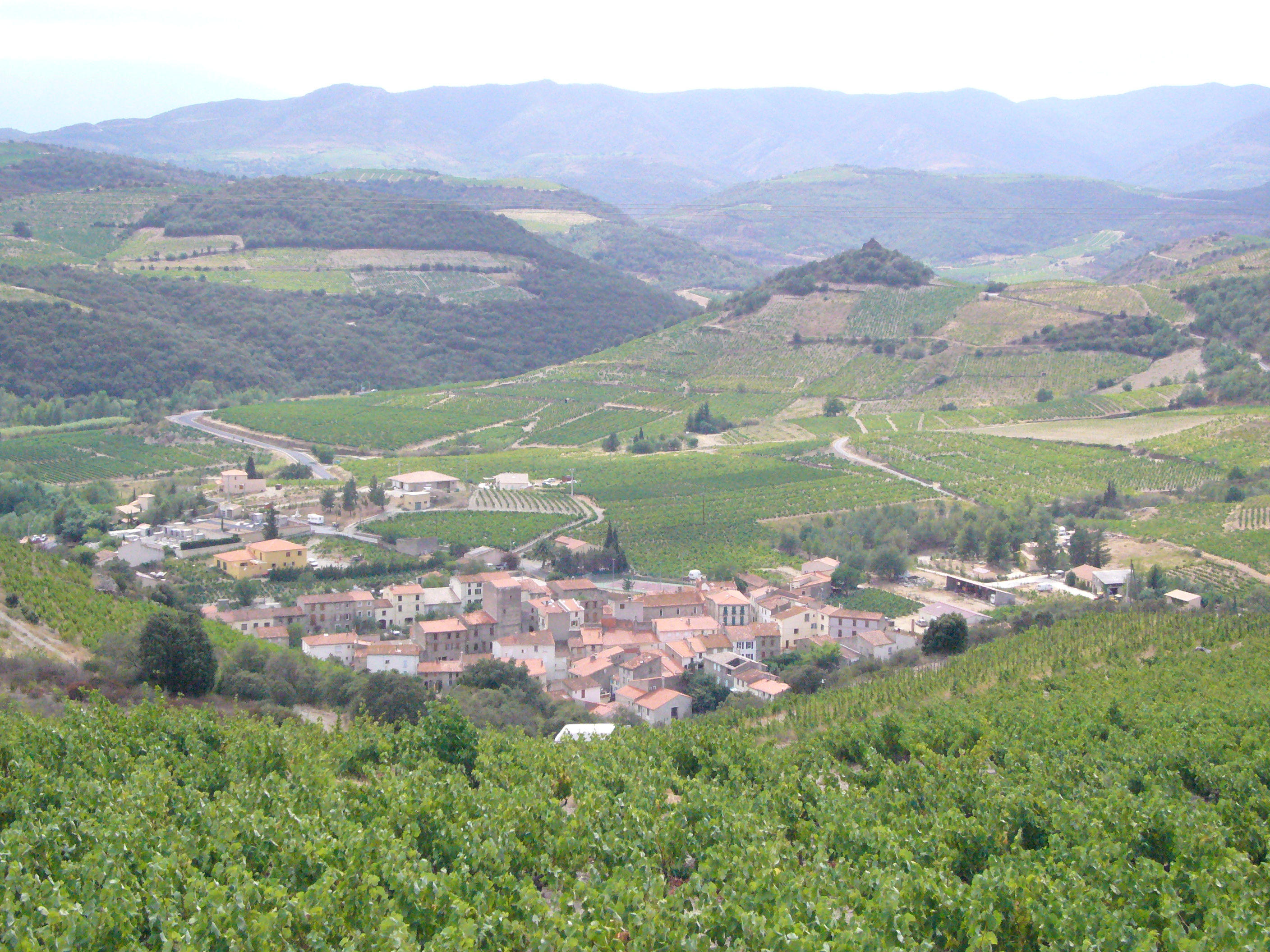 Rasiguères (66, France)